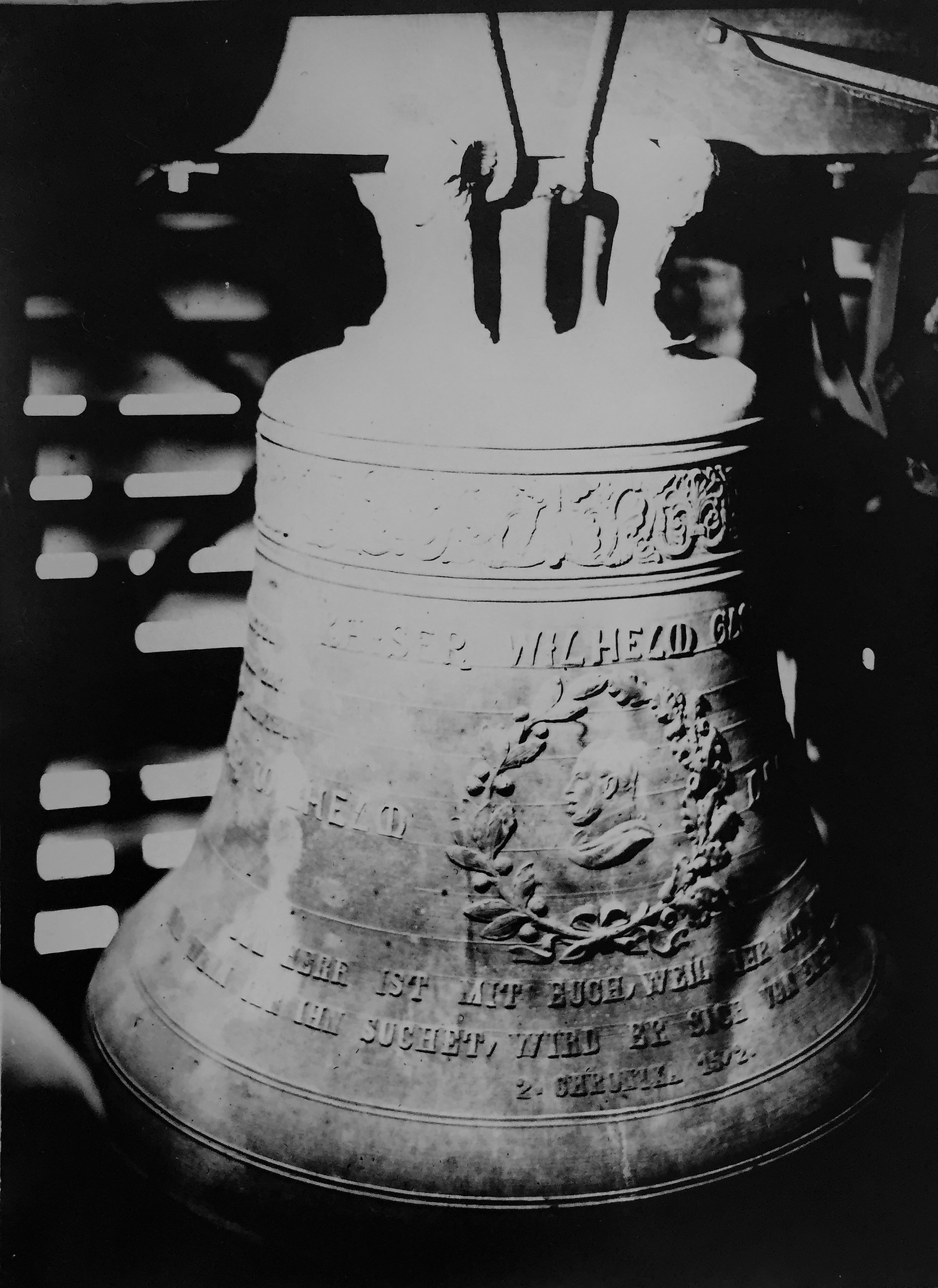 Kaiser-Wilhelm-Glocke (Foto Archiv der Gemeinde)